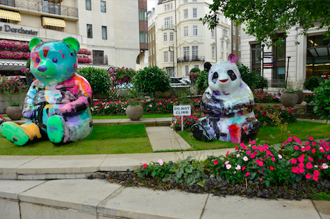 Sculptures de 2m30 au Park Lane, Hyde Park, Londres